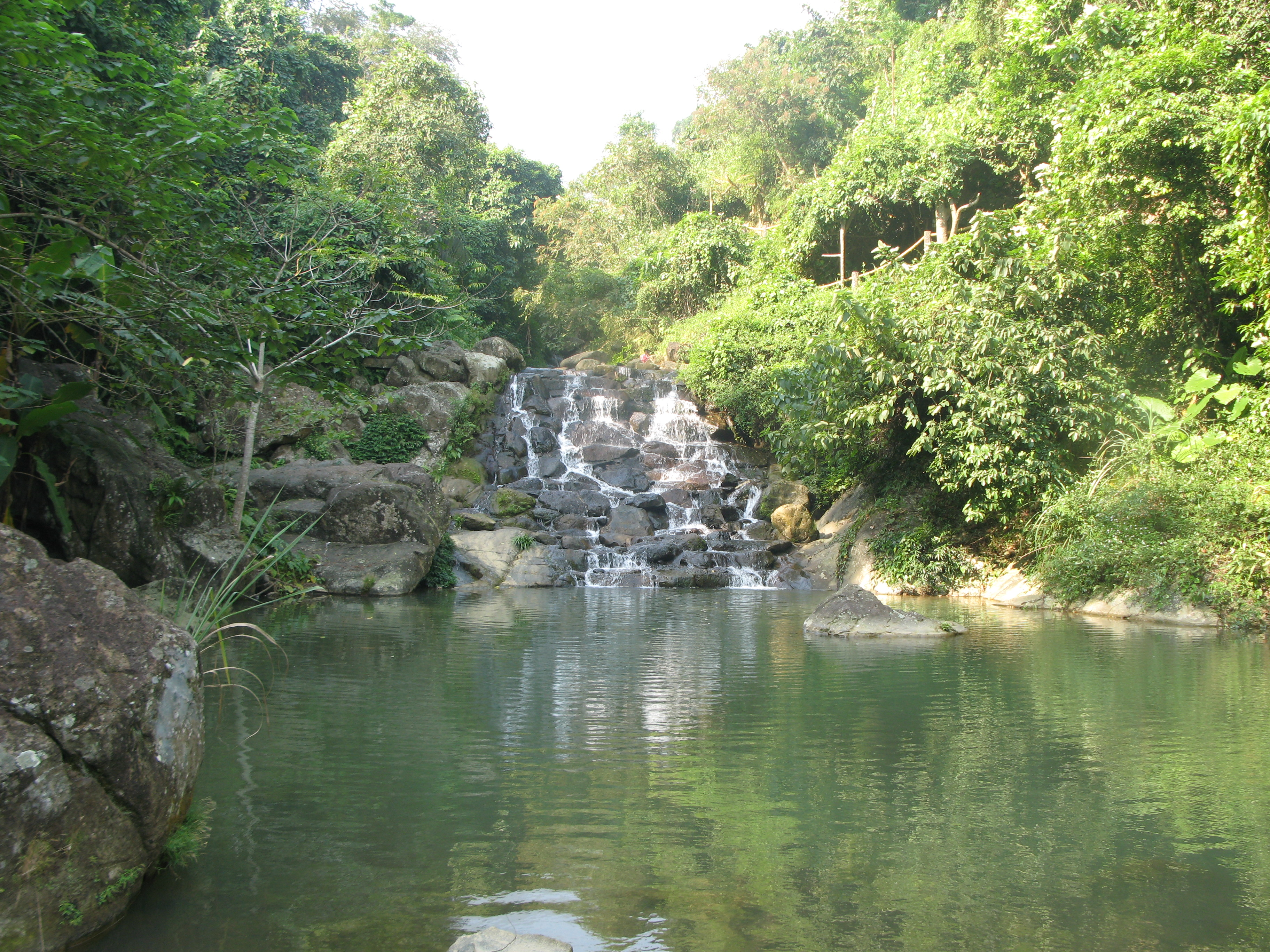 Thác Tam Cấp thuộc Khu Hạ Sơn, Khu du lịch sinh thái Thiên Sơn - Suối Ngà, Ba Vì, Hà Nội